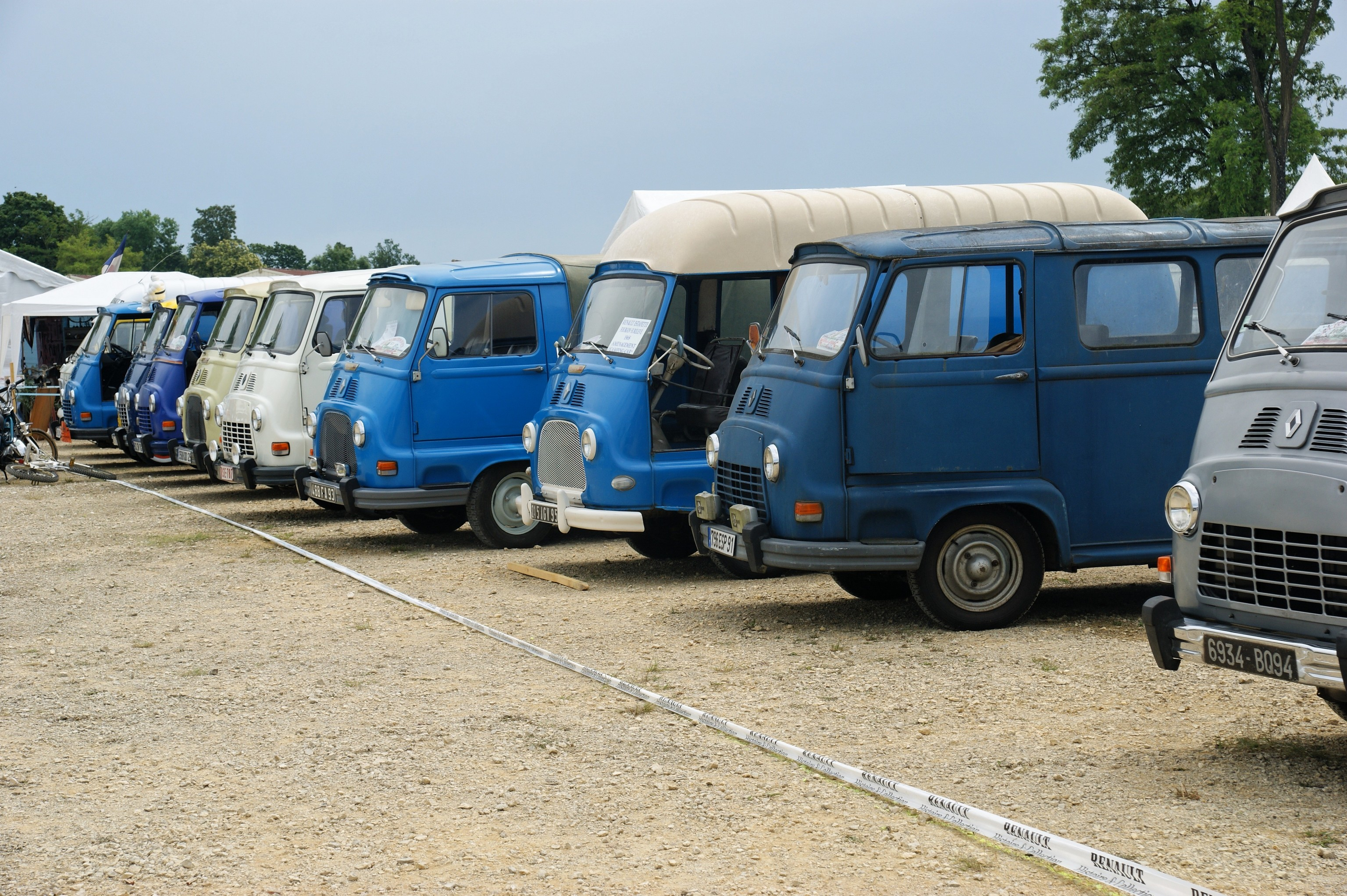 Exposition d'Estafettes à la Locomotion en Fête